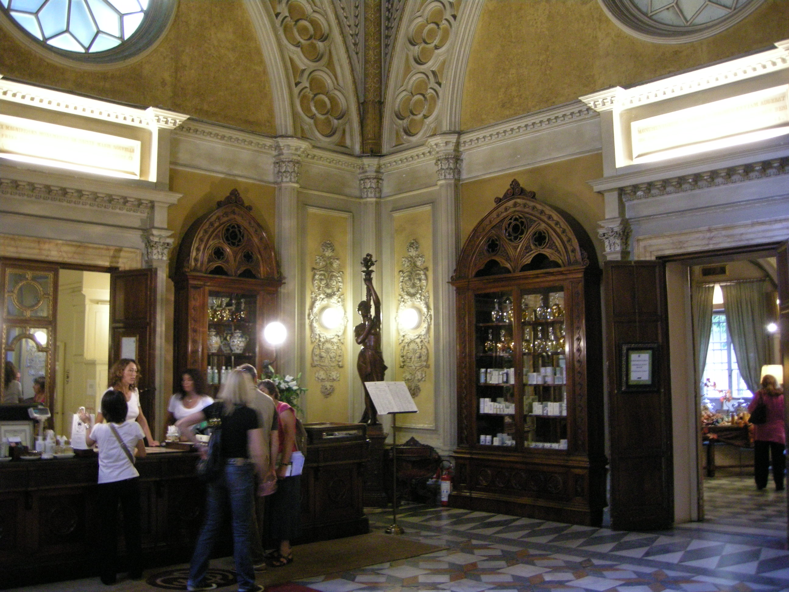 Farmacia di smn, sala vendita